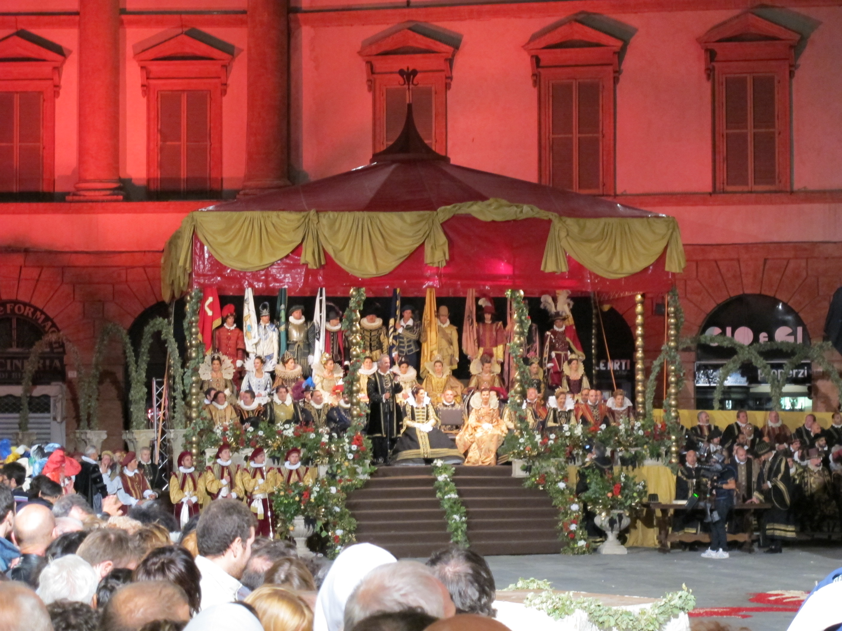 Quintana di foligno, parata